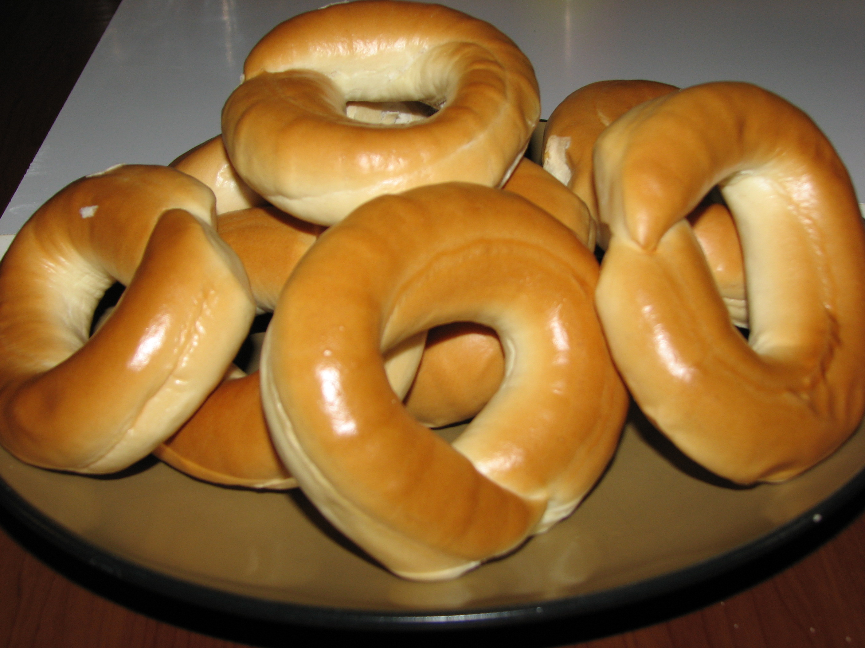 A plate of vesirinkeli.